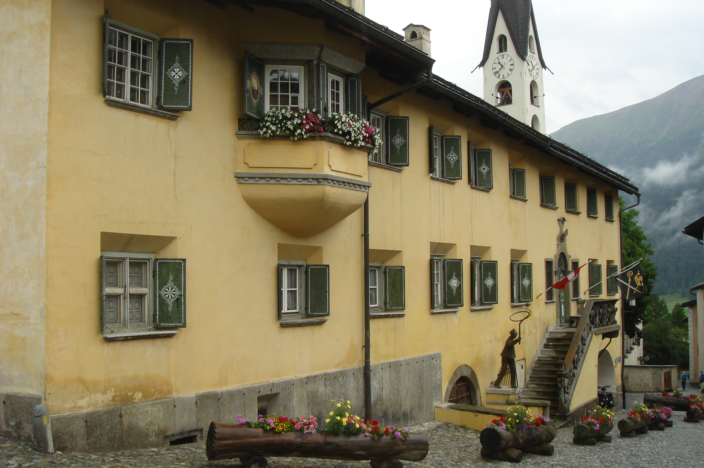 Haus Planta Suot (Chesa Planta Suot)